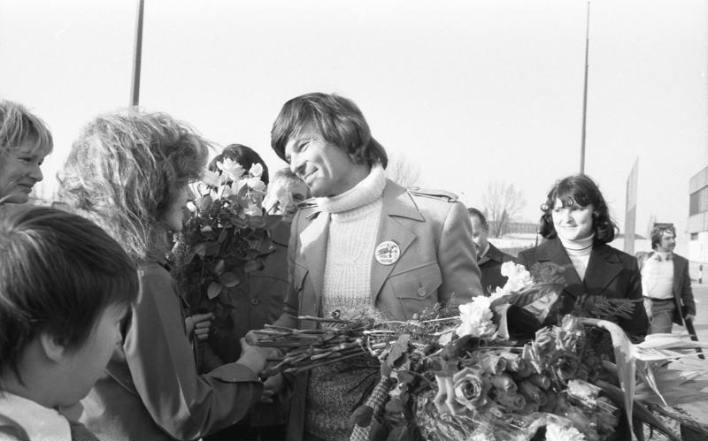 Berlin-Schönefeld, Empfang von Dean Reed ADN-ZB/Mittelstädt: 19.11.78/B/Berlin: Rückkehr von Dean Reed Dem bekannten Sänger, Schauspieler und Friedenskämpfer Dean Reed wurde heute auf dem Flughafen Berlin-Schönefeld bei seiner Rückkehr in die DDR ein überaus herzlicher Empfang zuteil. Reed, der zusammen mit anderen während einer Farmer-Demonstration verhaftet worden war, mußte vom Gericht in Buffalo auf Grund der Haltlosigkeit der Anklage und auch unter dem Eindruck der weltweiten Proteste gegen Willkürakt freigesprochen werden. Abgebildete Personen: Reed, Dean: Schauspieler, Folkloresänger, Mitglied des Weltfriedensrates, USA (GND 118598929)